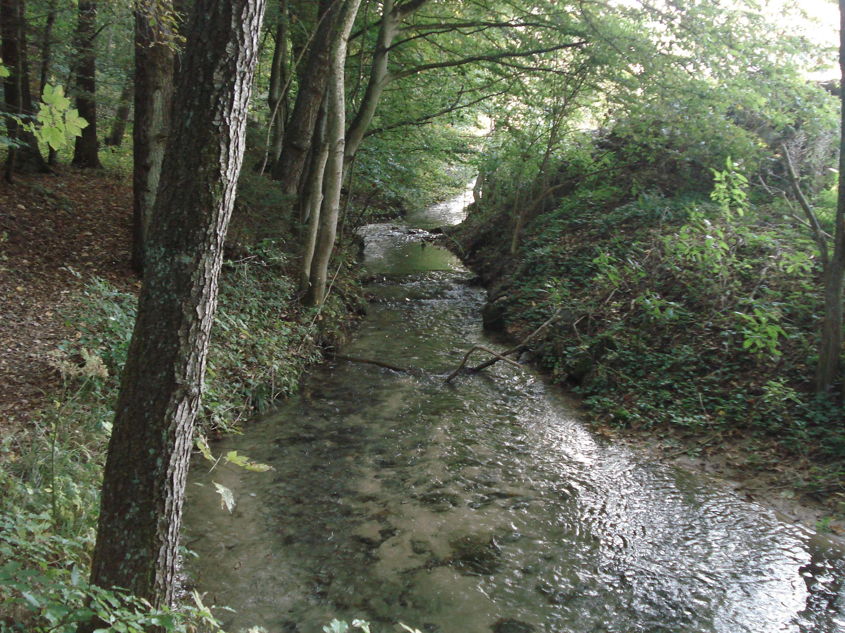 Die Schwalb an der Untermühle